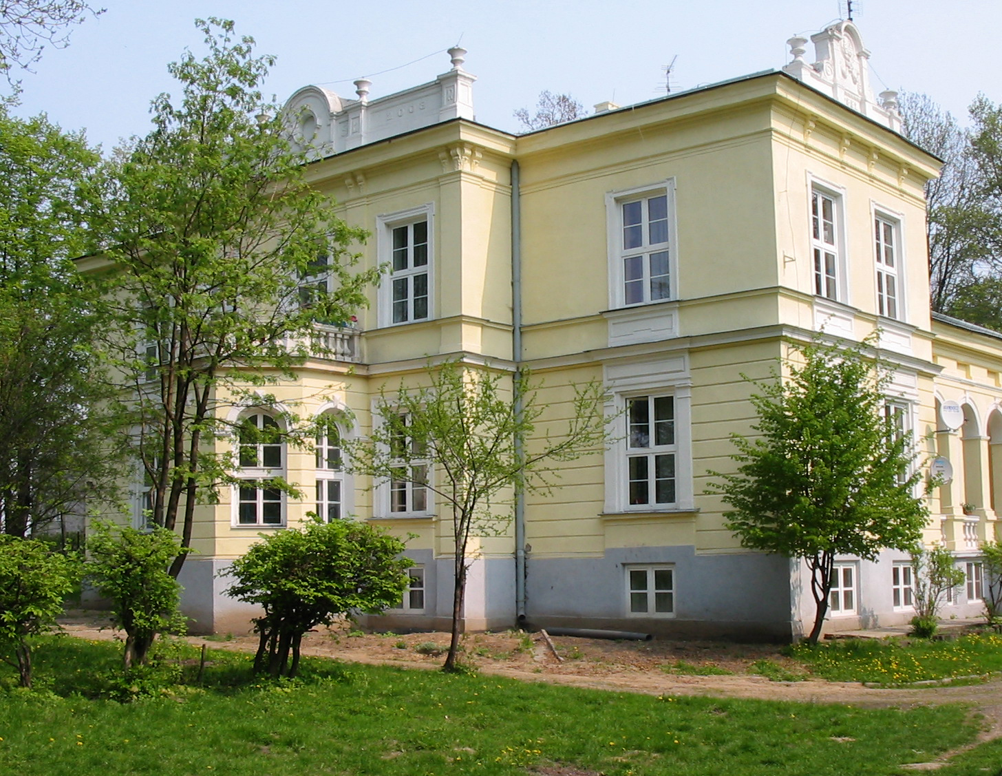 Dwór w Sieborowicach, widok od strony południowo-zachodniej - maj 2006